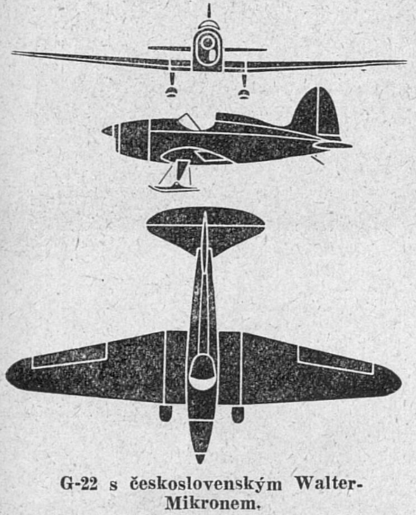 Gribovskij G-22 (1936)